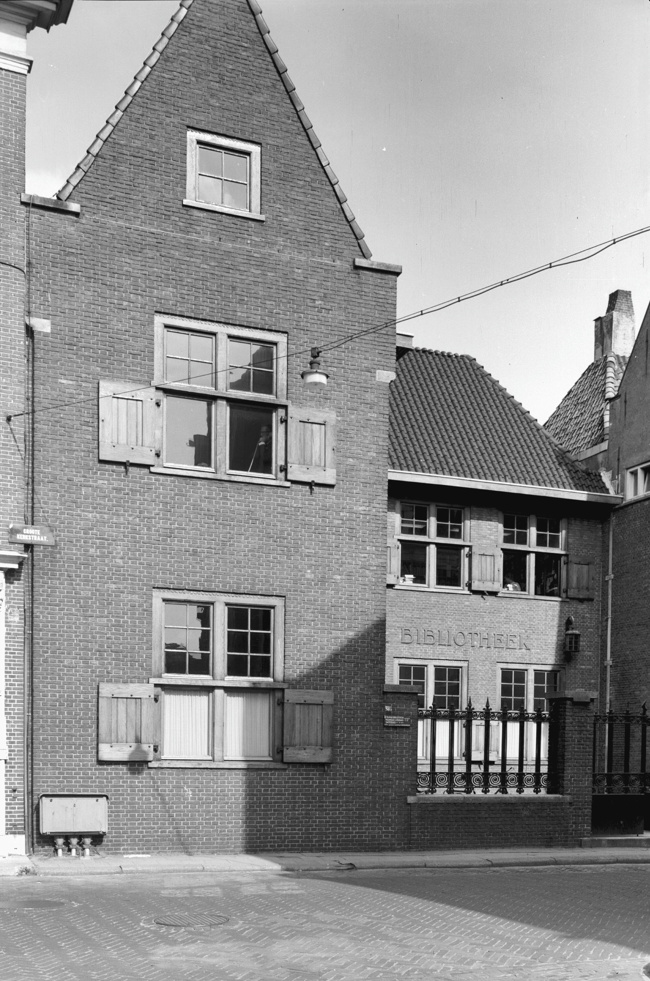 voorgevel